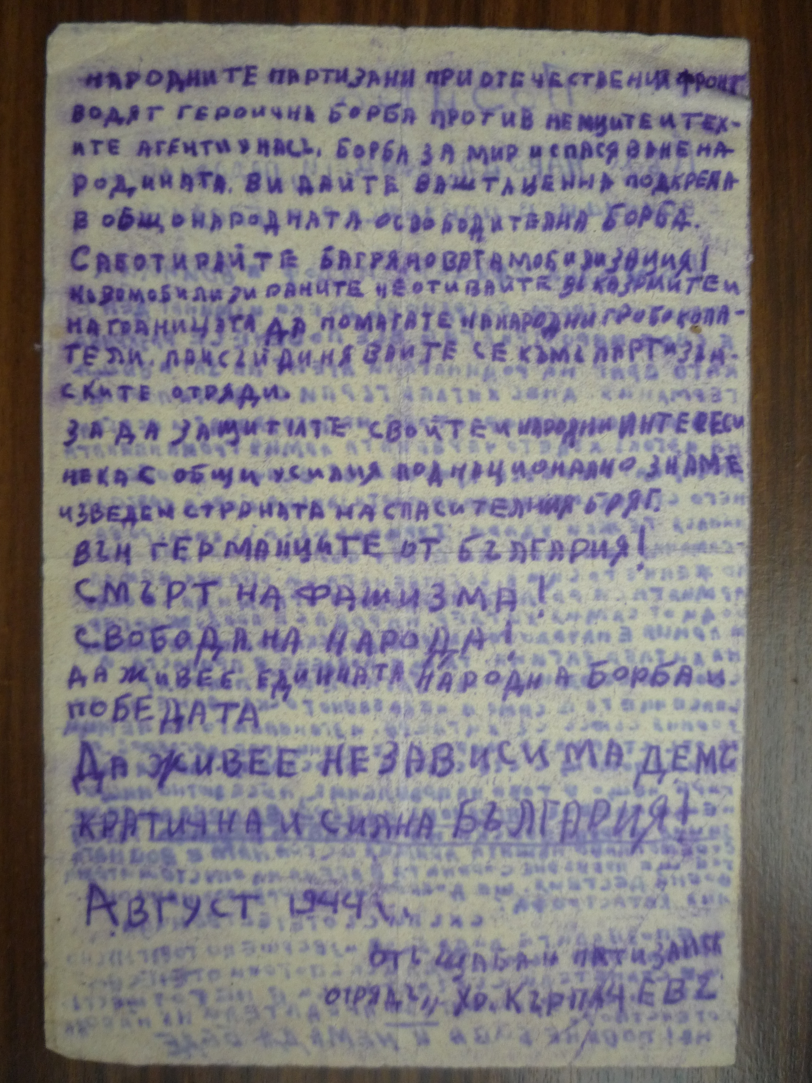 Позив на Партизански отряд "Христо Кърпачев", август 1944 г., лозунг "Смърт на фашизма, свобода на народа!".